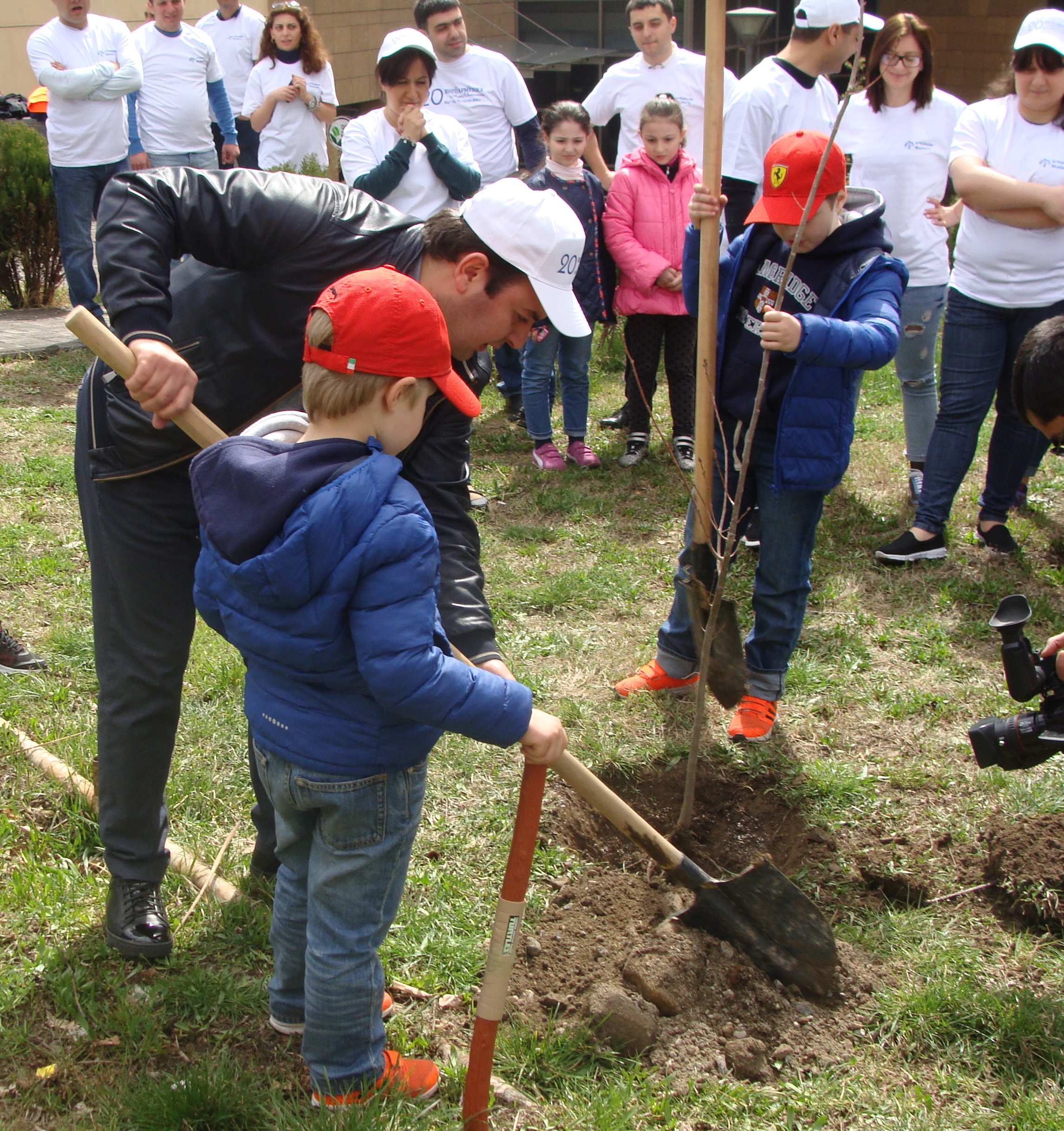 ԻՆԳՈ ԱՐՄԵՆԻԱ-ն կազմակերպել էր ծառատունկ Հայաստանում Ամերիկյան Համալսարանի զբոսայգում